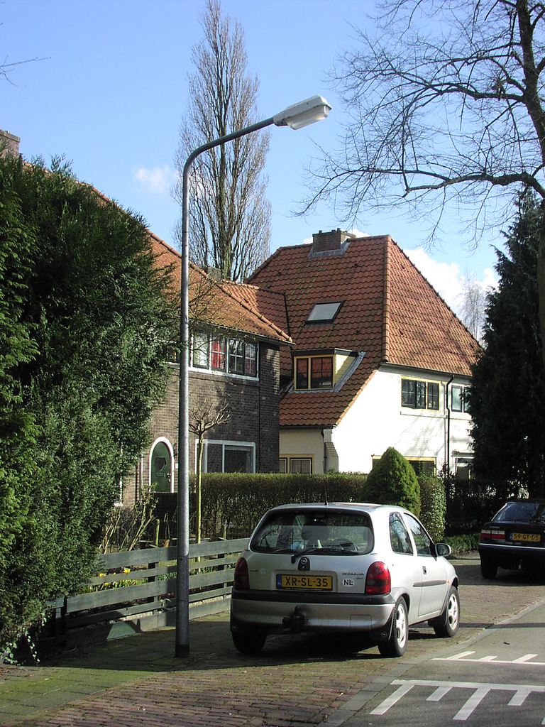 Industria 2600 lantaarnpaal te Hilversum